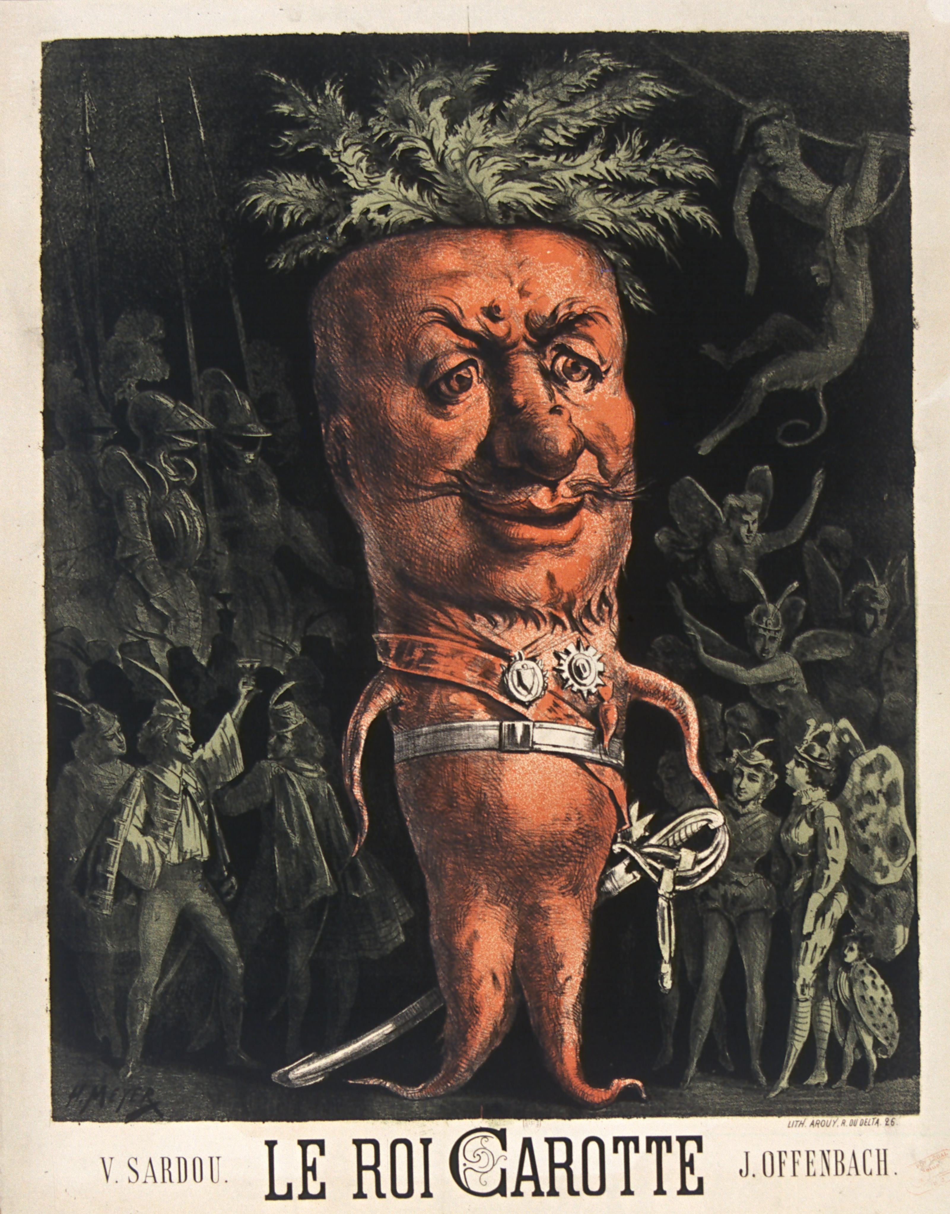 Le personnage principal est au centre de face sous forme d'une caricature grotesque de couleur et en forme de carotte. Ses membres sont limités à quatre radicelles sans extrémités. Le visage niais occupe la moitié du personnage, les cheveux sont représentés par une une touffe d’herbe. Il porte une ceinture sur une taille qui n’existe pas, et un baudrier auquel est suspendu un sabre qui lui bat les talons. Il est affublé de deux décorations : l'une est suspendue à un collier l'autre est épinglée sur son coeur.